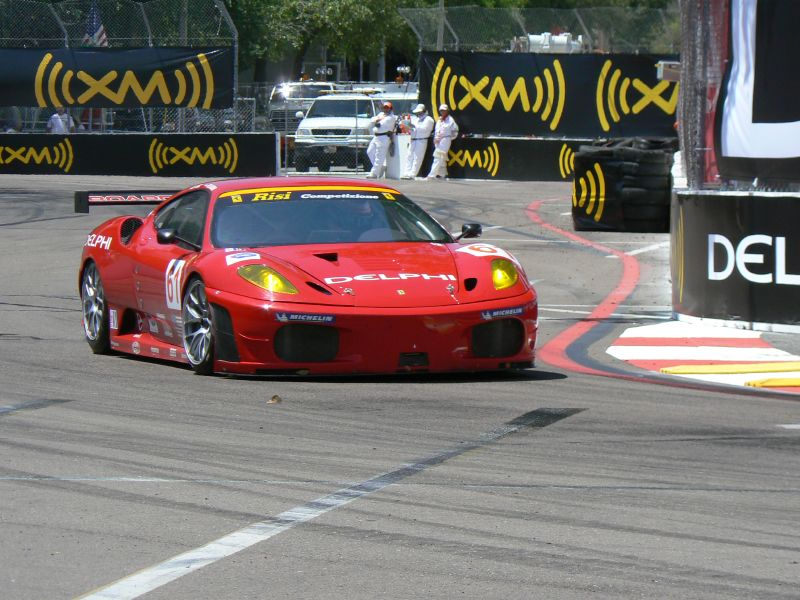 Risi Competizione's Ferrari F430GT